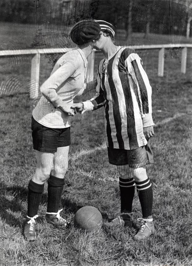 Nationaal Archief / Spaarnestad Photo, SFA022004194 Damesvoetbal in 1920, tussen Engeland en Frankrijk (uitslag 2-0) te Preston, Engeland 1920. Foto: De begroeting tussen de beide aanvoersters (de Engelse met het gestreepte shirt). Women’s football. The team captains greet each other with a kiss. England, Preston, 1920. Collectie Spaarnestad Voor meer informatie en voor meer foto’s uit de collectie van Spaarnestad Photo, bezoek onze Beeldbank: U kunt ons helpen onze kennis van de fotocollecties te verrijken door tags en commentaren toe te voegen. Herkent u mensen of locaties of heeft u een bijzonder verhaal te vertellen bij één van de foto’s, laat dan een reactie achter (als u ingelogd bent bij Flickr) of stuur een mailtje naar: You can help us gain more knowledge on the content of our collection by simply adding a comment with information. If you do not wish to log in, you can write an e-mail to